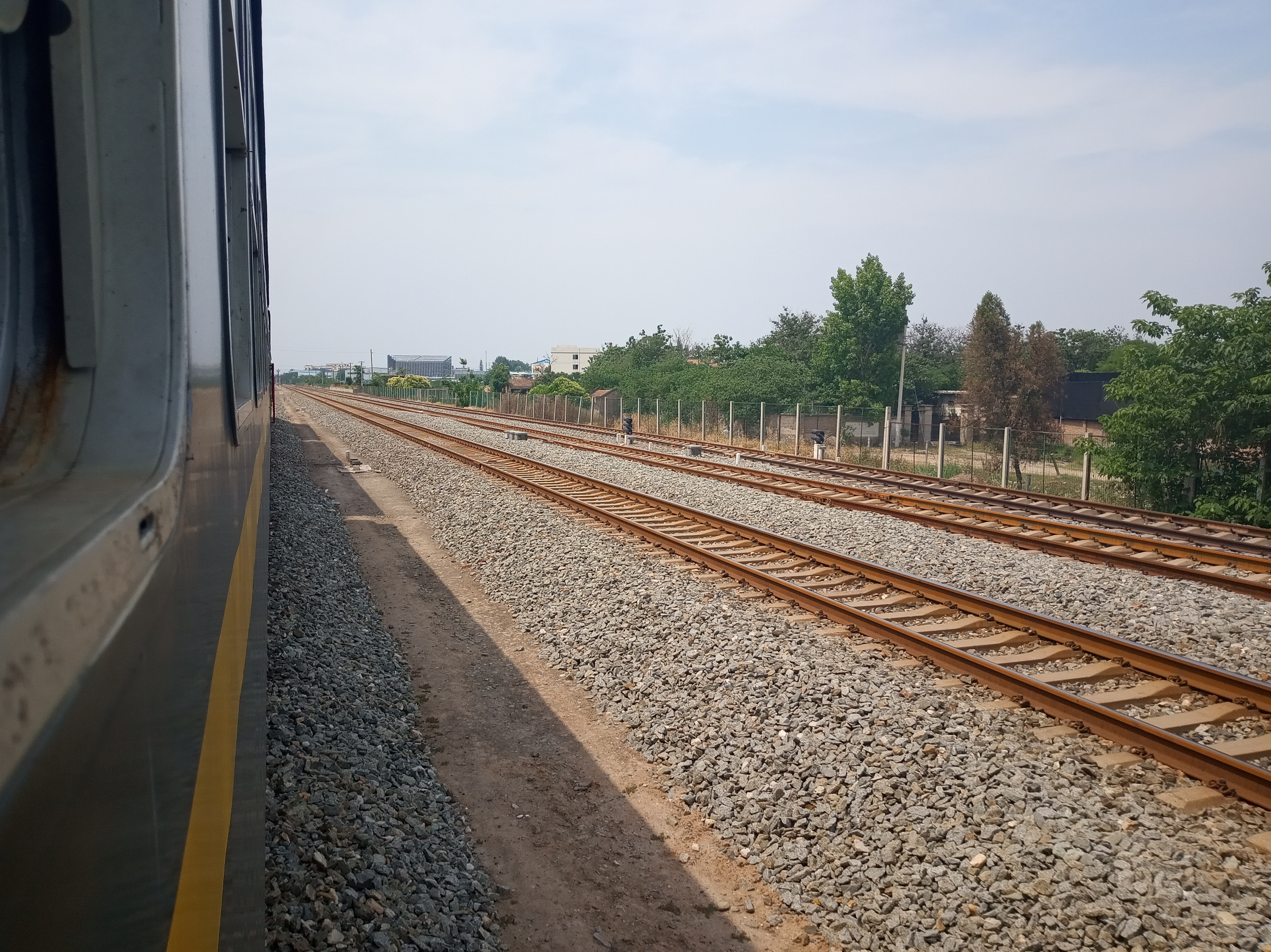 7001在永乐店站